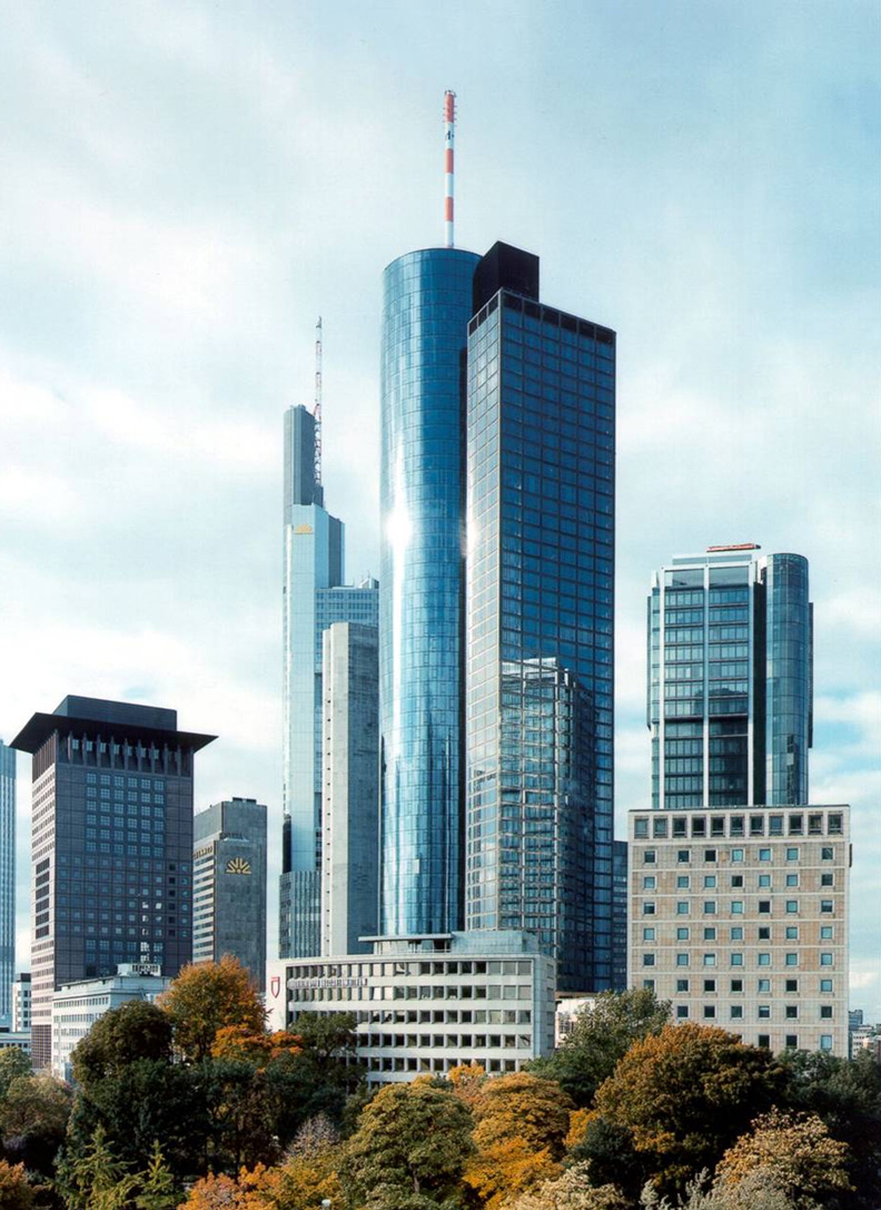 Maintower, Frankfurt